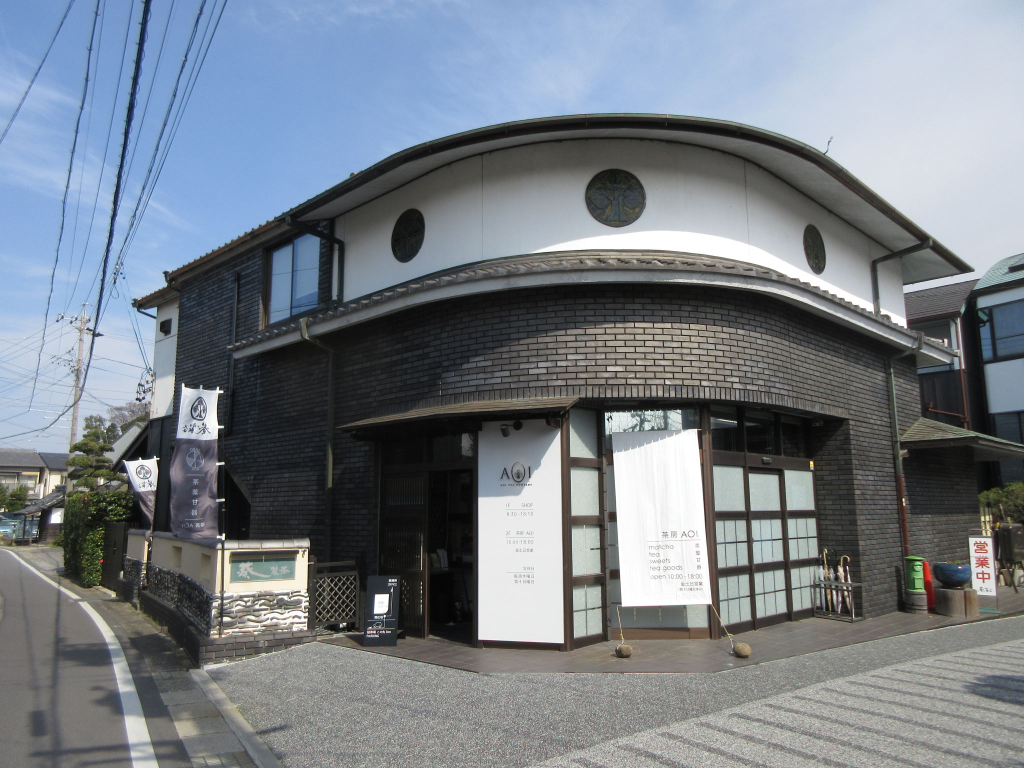 株式会社葵製茶（西尾市上町上屋敷7番地）